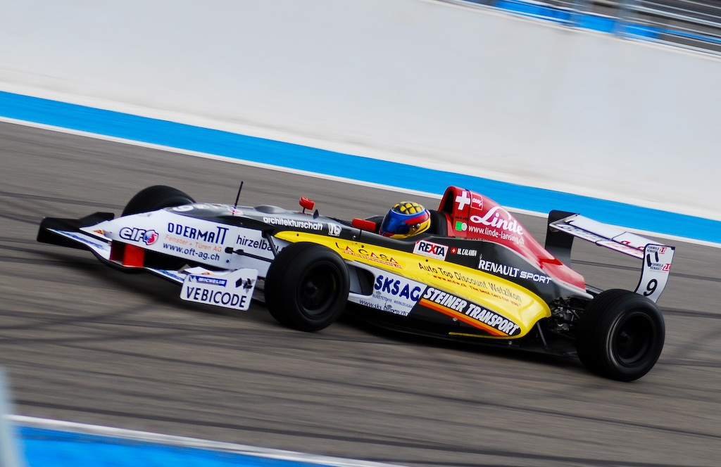 Mauro Calamia in Formula Renault 2.0 Alps at Circuit Paul Ricard in 2011. Original description from Flickr: 2011 Alps Formula Renault 2.0 - Circuit Paul Ricard